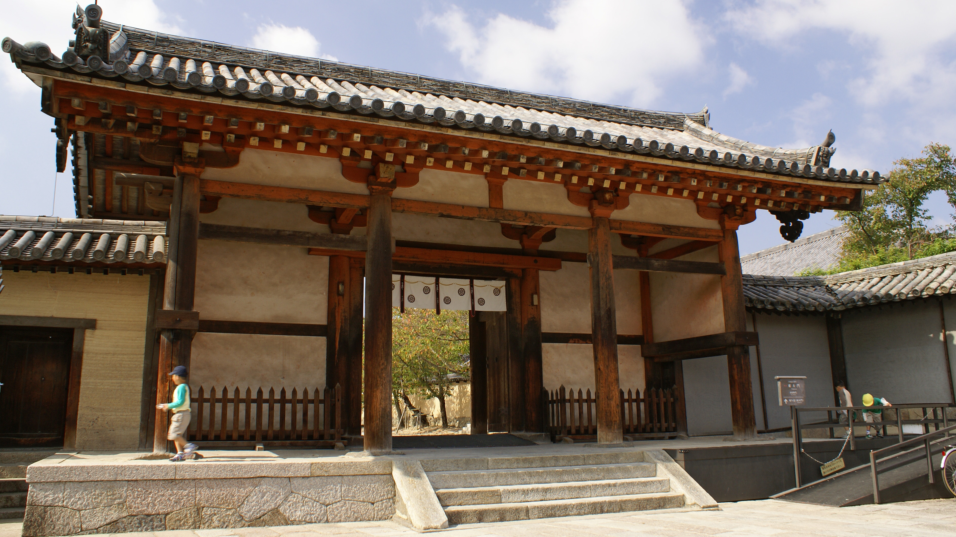 Horyu-ji in Ikaruga, Nara, Japan